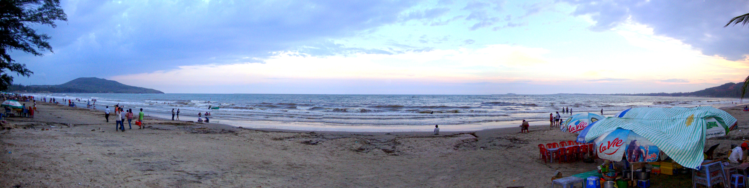 Tầm nhìn từ KDL Thùy Trang